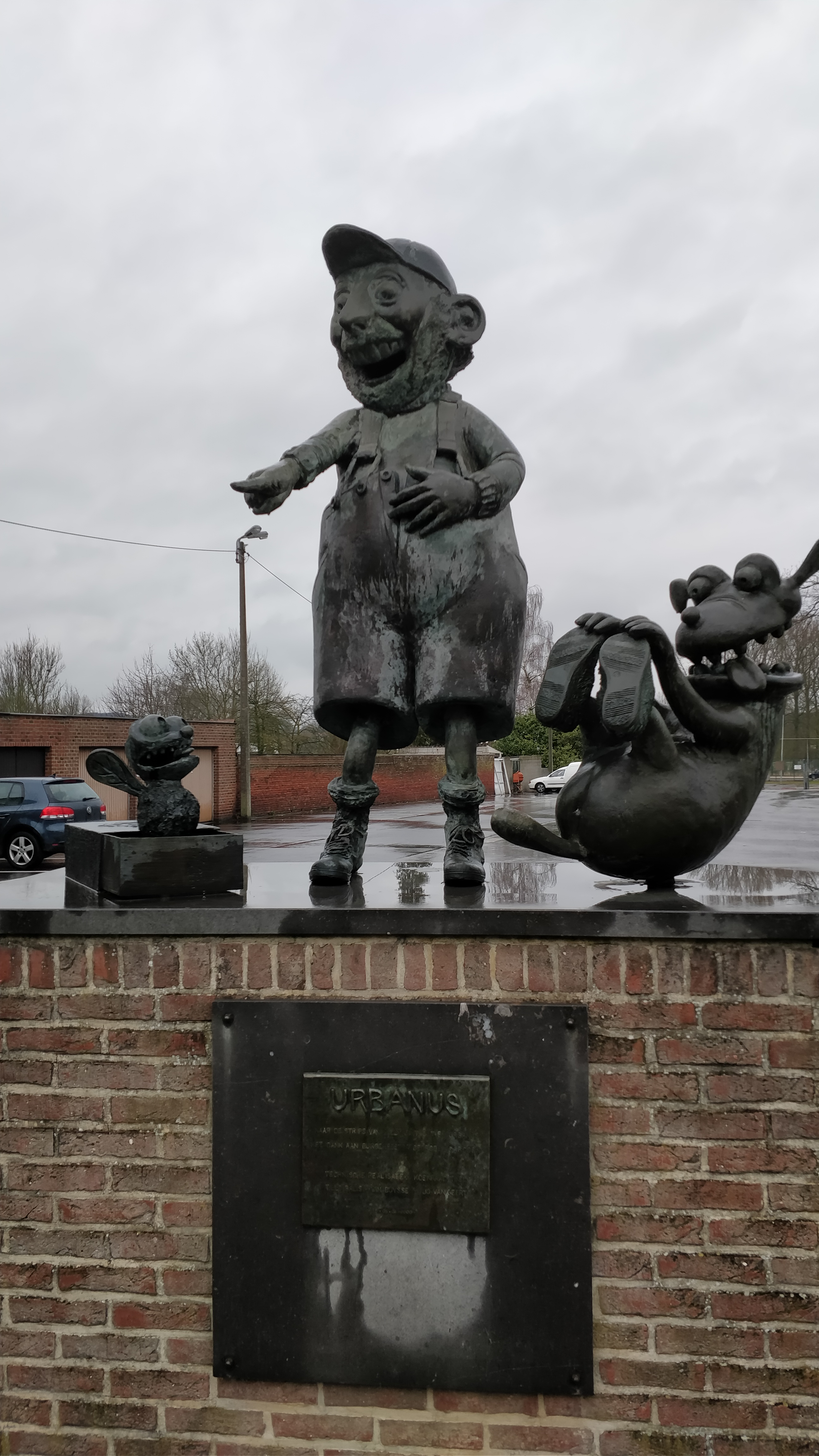 Standbeeld Urbanus te Tollembeek